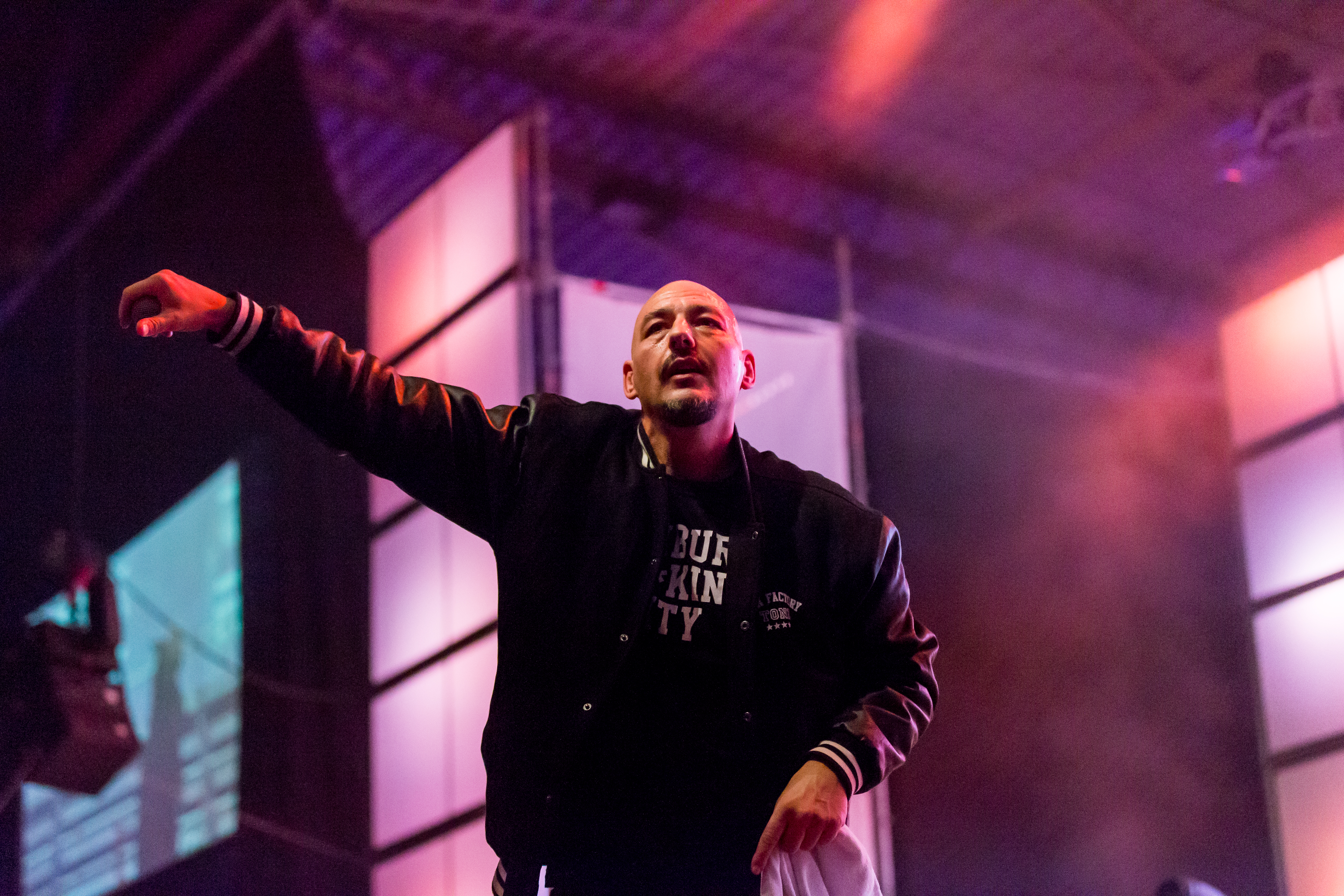 Fun Factory during sunshine live "Die 90er - Live on Stage" at Maimarkt Halle, Mannheim, Baden-Württemberg, Germany on 2015-11-28, Photo: Sven Mandel